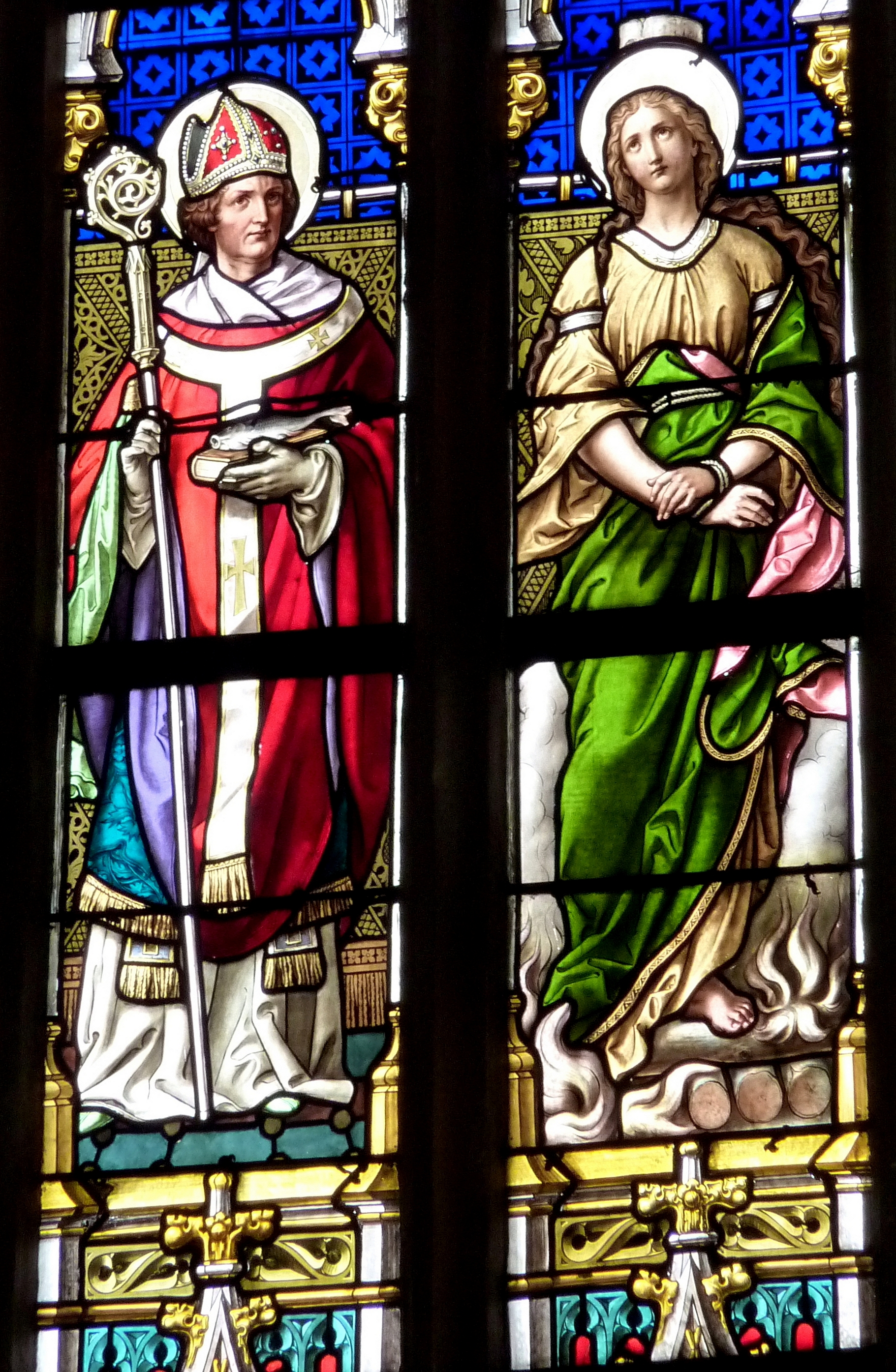 Katholische Pfarrkirche St. Peter und Paul in Hausen, einem Stadtteil von Dillingen im Landkreis Dillingen an der Donau (Bayern), Chorfenster mit der Darstellung des hl. Ulrich und der hl. Afra